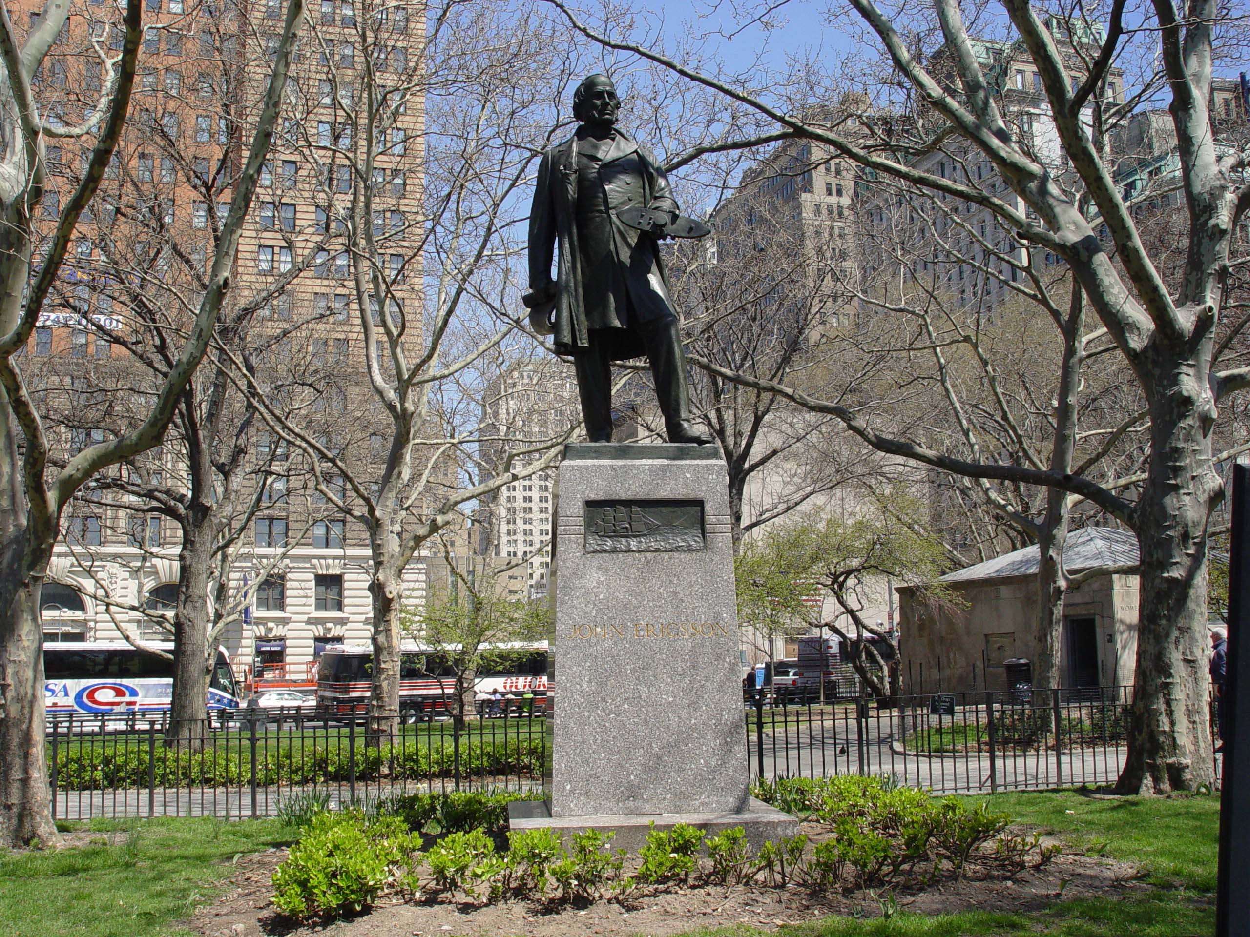 Fotografiert von Martin Dürrschnabel John Ericsson Denkmal im Battery Park in New York City.